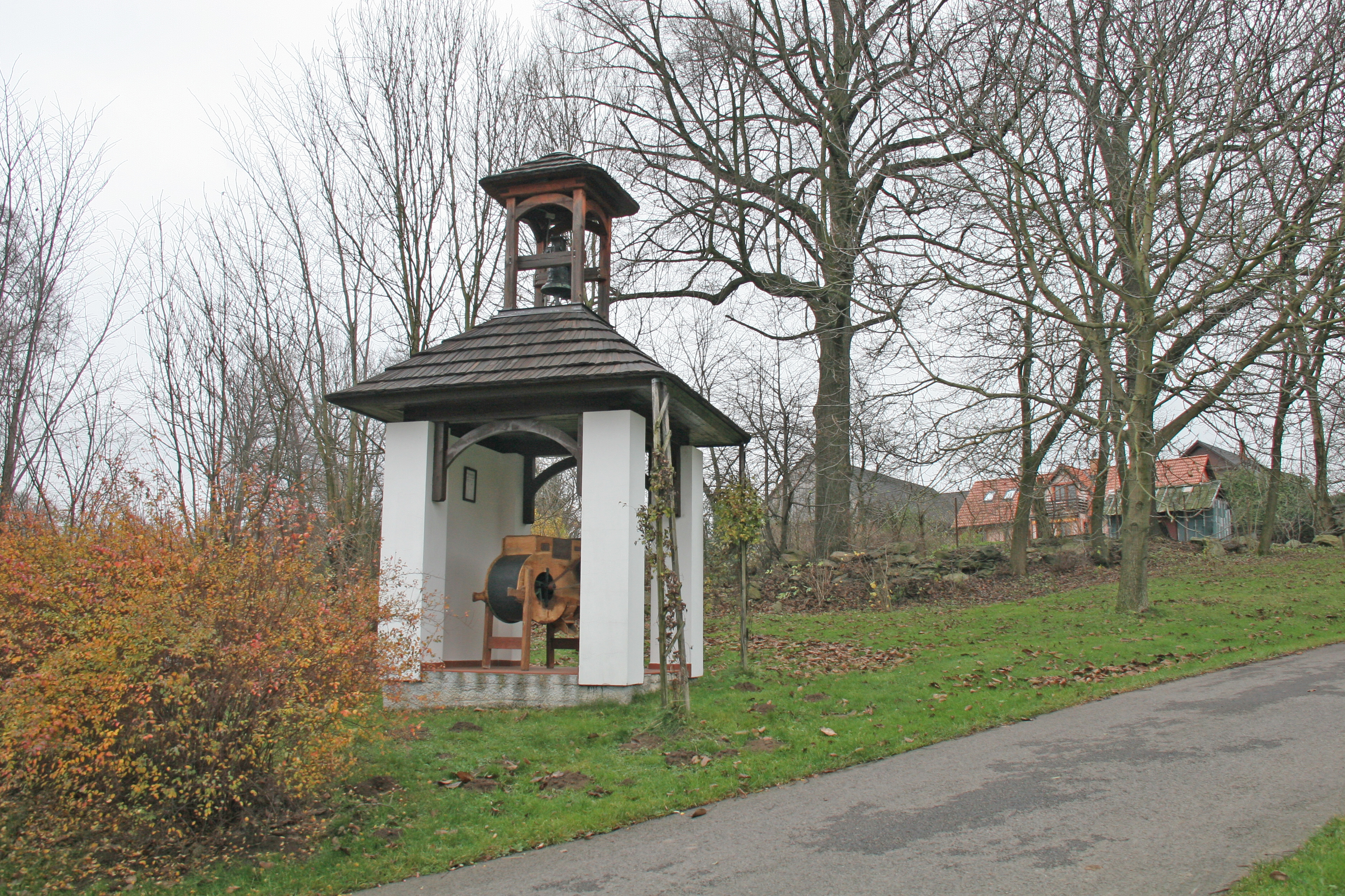 Polánka zvonička